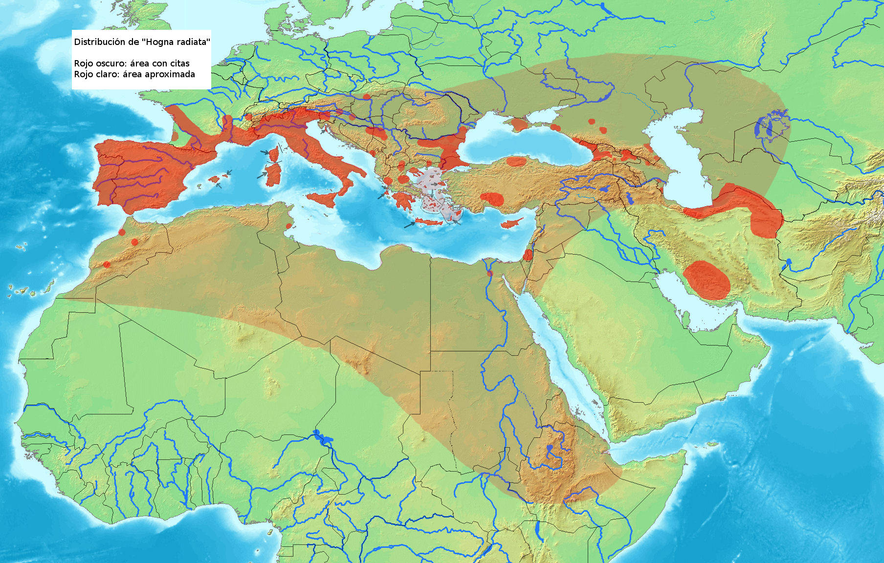 Distribución de la araña "Hogna radiata" (Lycosidae)